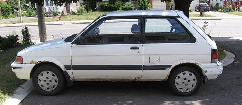 Subaru Justy mit typischen Roststellen